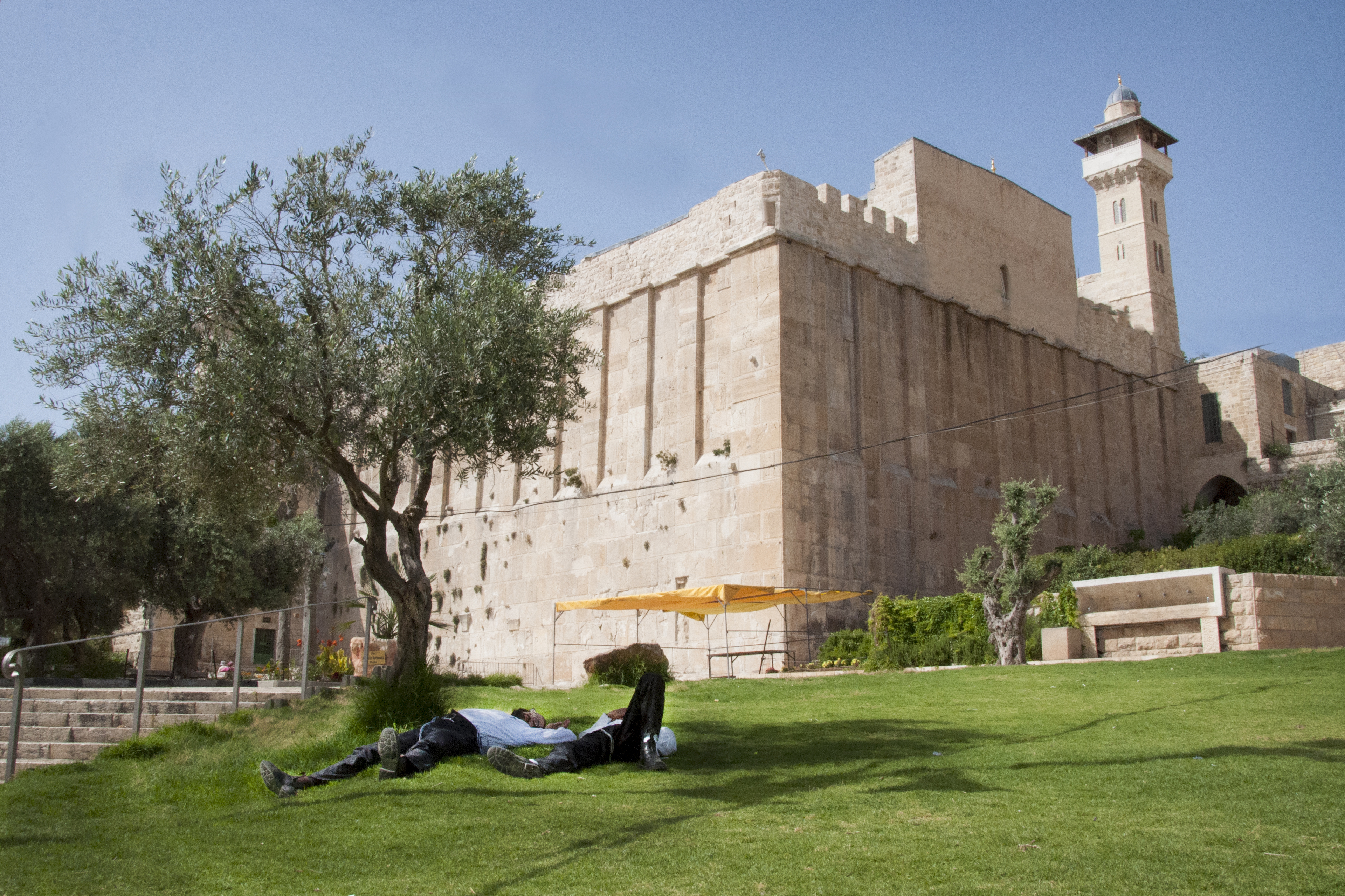 ספריית בני ברית או בית נאמן היה מבנה שהוקם על ידי ארגון בני ברית ושימש בתחילת המאה ה-20 כספרייה ובסיס למה שהיווה בהמשך הספריה הלאומית בירושלים. כיום משמש את "הסתדרות הרבנים של ארצות הברית" ואת הרבנות הצבאית במדרשה לקיום הרצאות ושיעורי תורה לחיילי צה"ל.